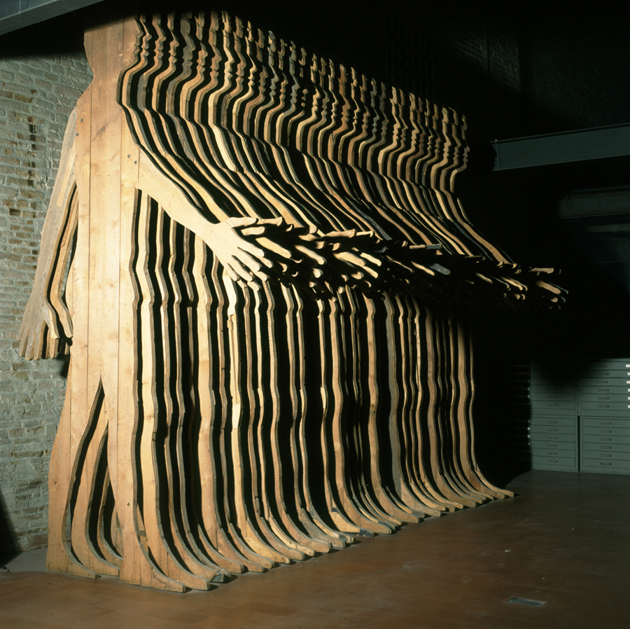 La Grande Cina (1968) di Mario Ceroli, presso CSAC - Centro Studi e Archivio della Comunicazione di Parma